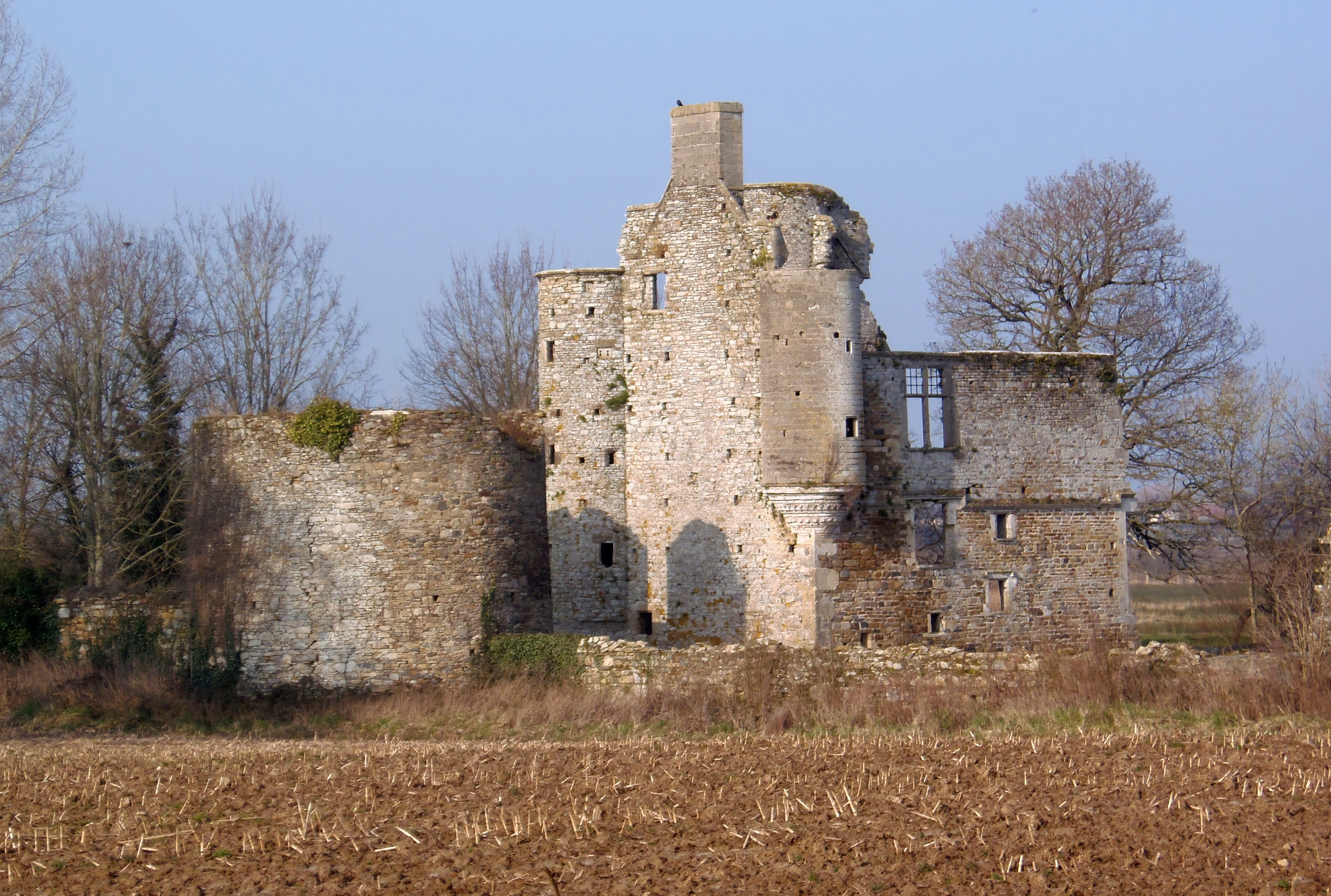 Remilly-sur-Lozon (Normandie, France). Ruine du château de Montfort.